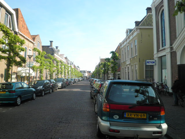 Overzicht van de straat Ramen in Hoorn, Noord-Holland